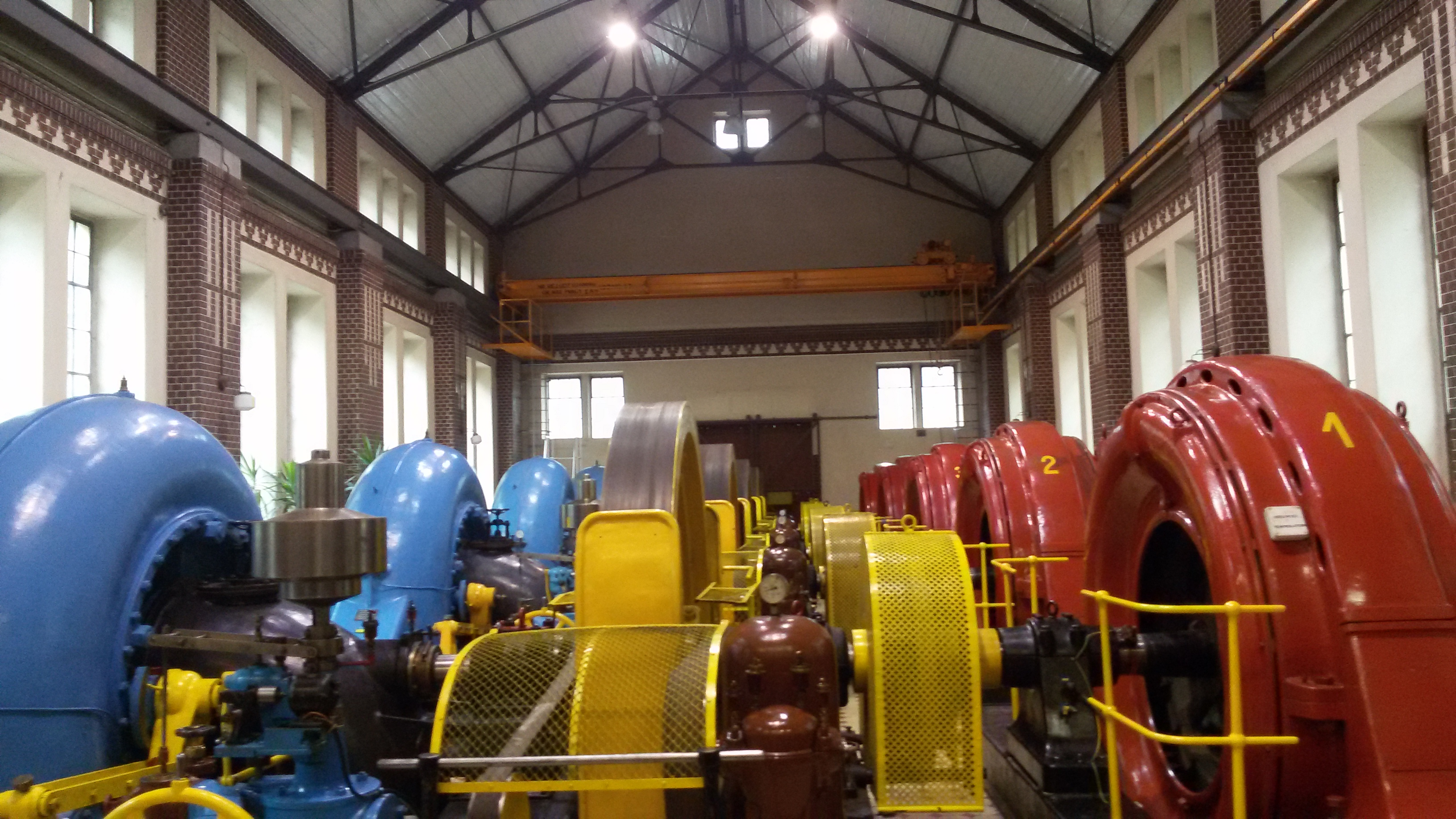 zdjęcie maszyn w Leśnej